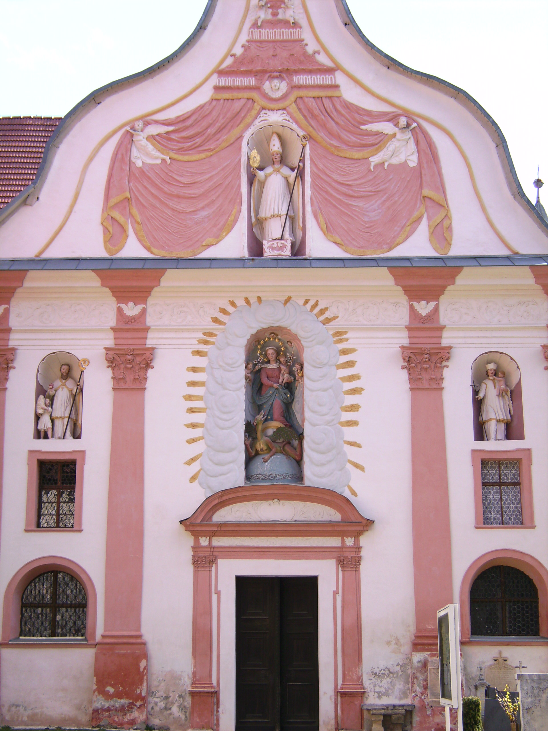 Portalseite von Stift Griffen.